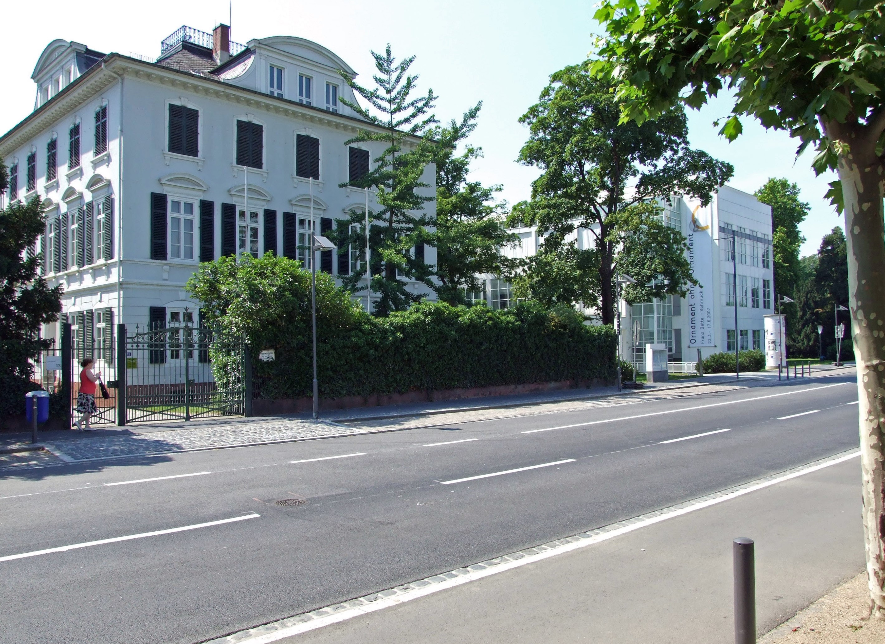 Museum für Angewandte Kunst, Villa Metzler und Neubau von Richard Meier (Architekt)